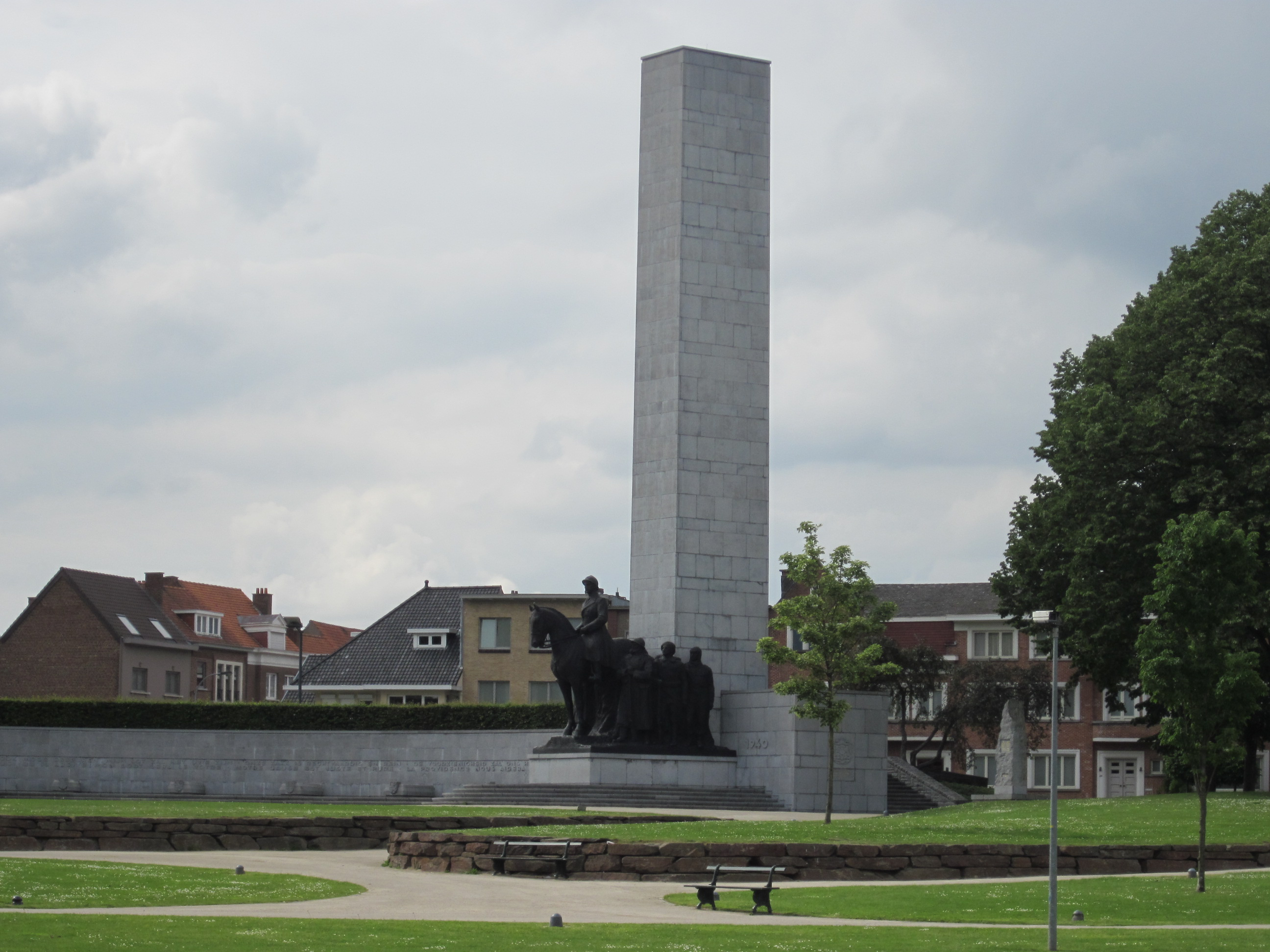 Leiemonument, Koning Albertpark Kortrijk